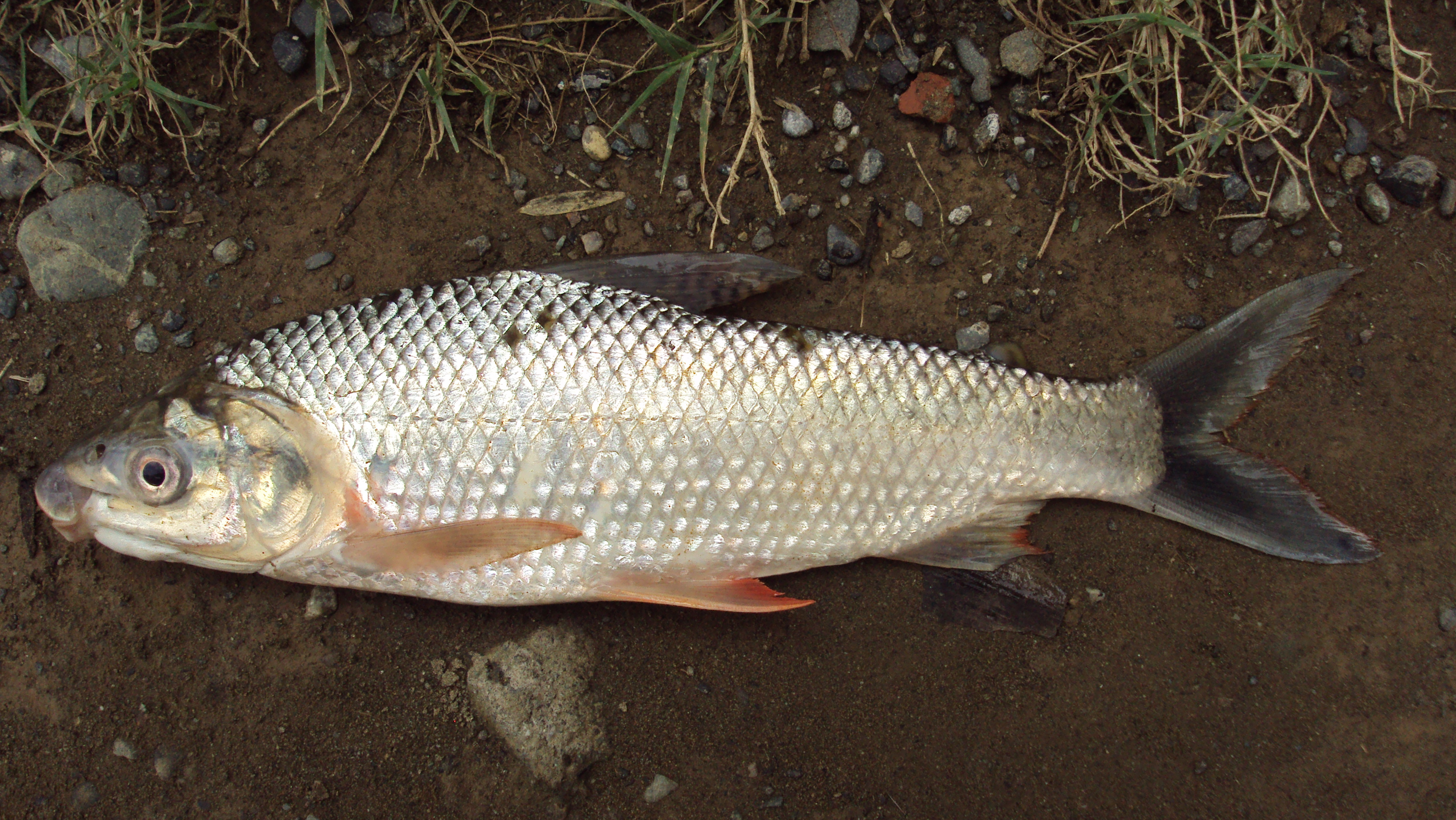 By: Zuluaga-Gómez A.